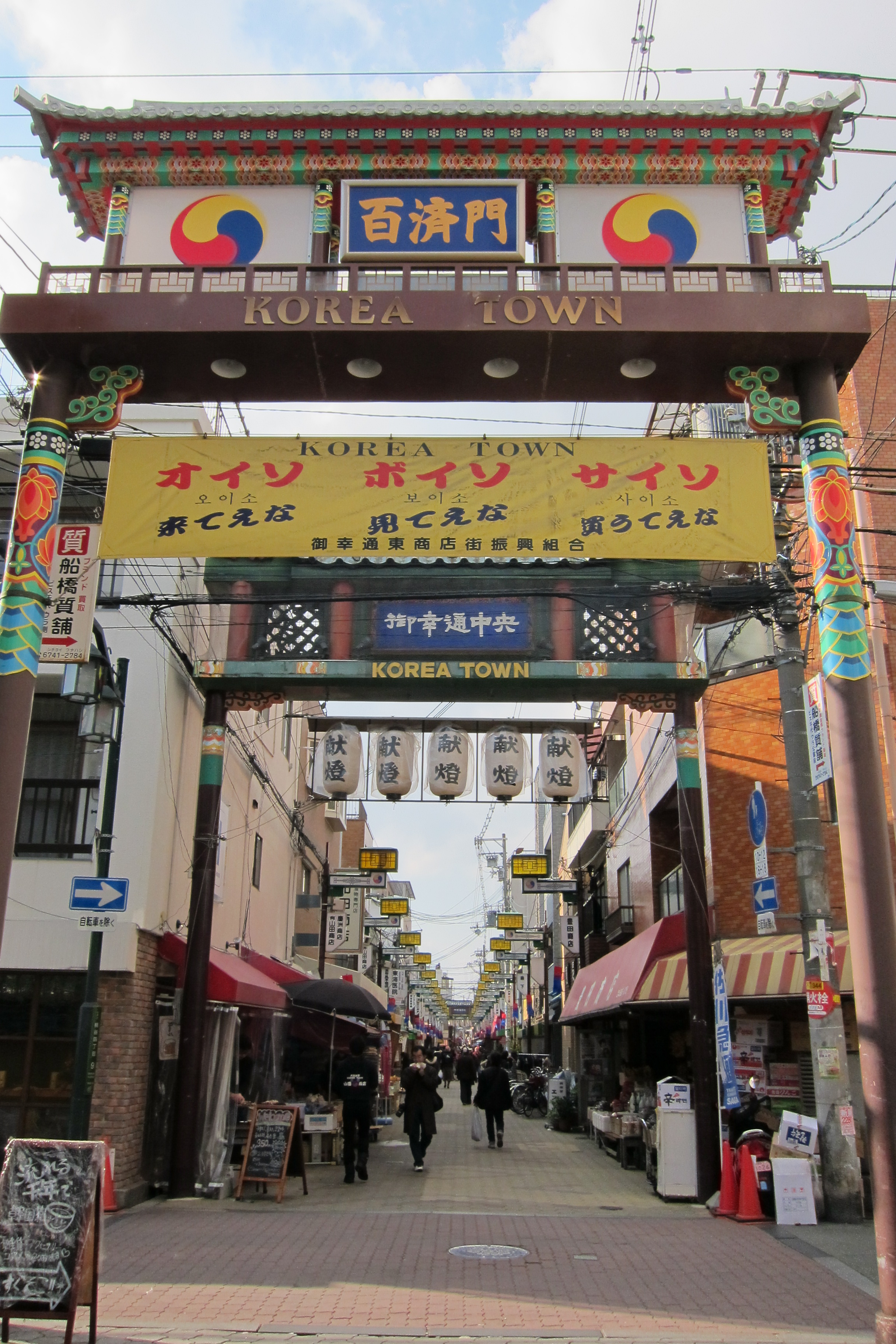 Ikuno Korea Town (御幸通中央商店街) at Osaka City, Japan.